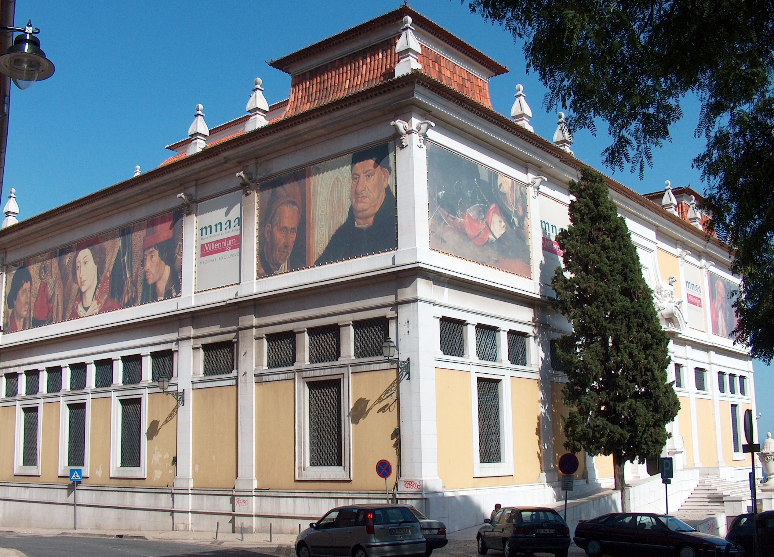 Museu Nacional de Arte Antiga, Museu das Janelas Verdes ou Palácio Alvor This file was uploaded for Wiki Loves Monuments in Portugal with the unique identifier 73649.